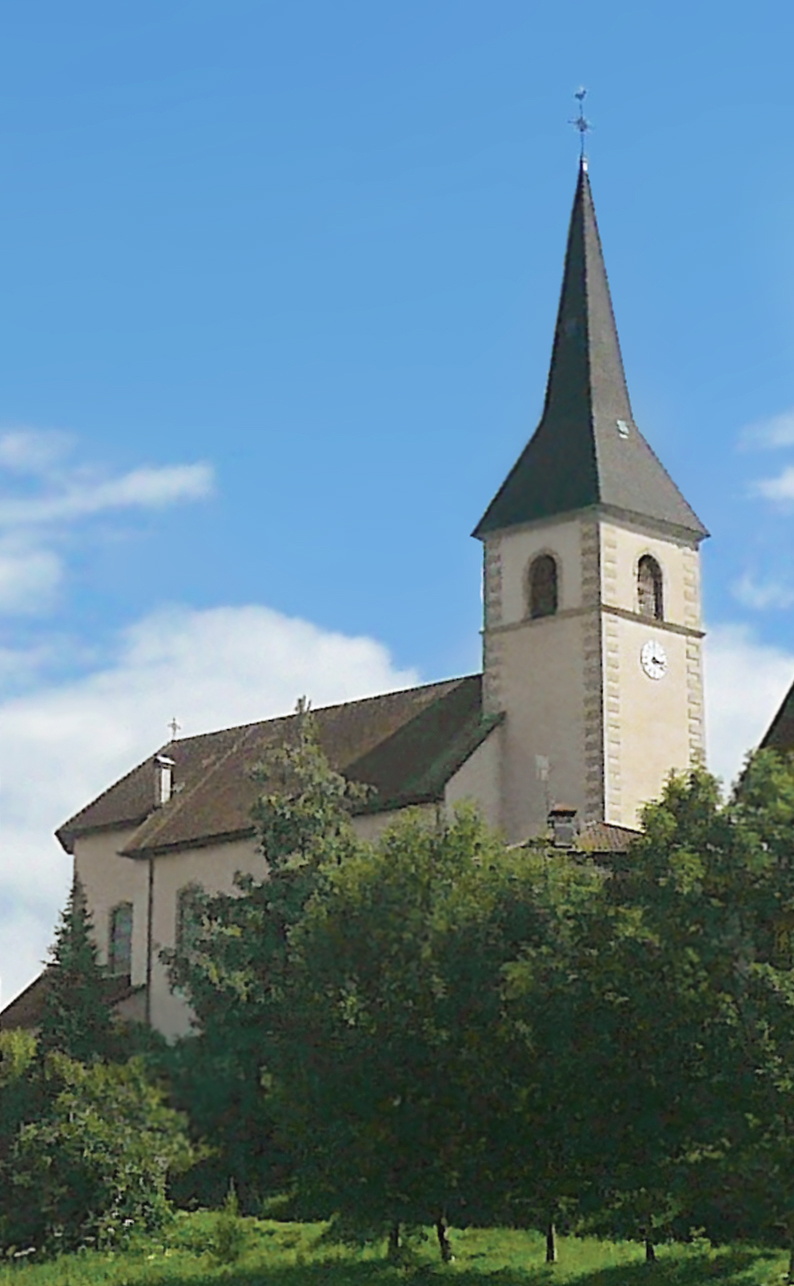 Église Saint-Ferréol de Publier, en Haute-Savoie.